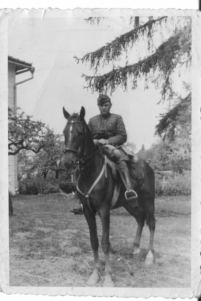 Полковник Никола Ботев - командир на 31 пехотен полк